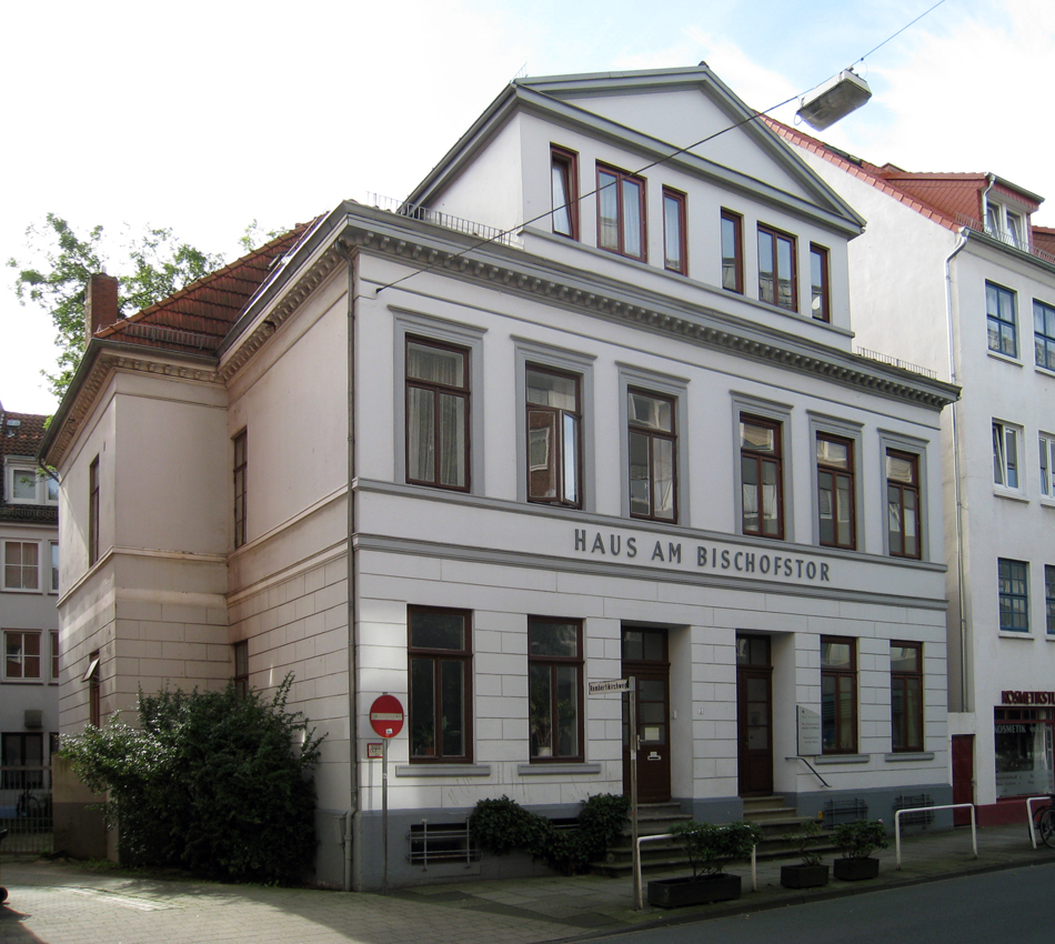 Haus am Bischofstor in Bremen, Rembertistraße 4.Das abgebildete Objekt ist ein geschütztes Kulturdenkmal in der Freien Hansestadt Bremen, mit der Nr. 1029 beim Landesamt für Denkmalpflege registriert.